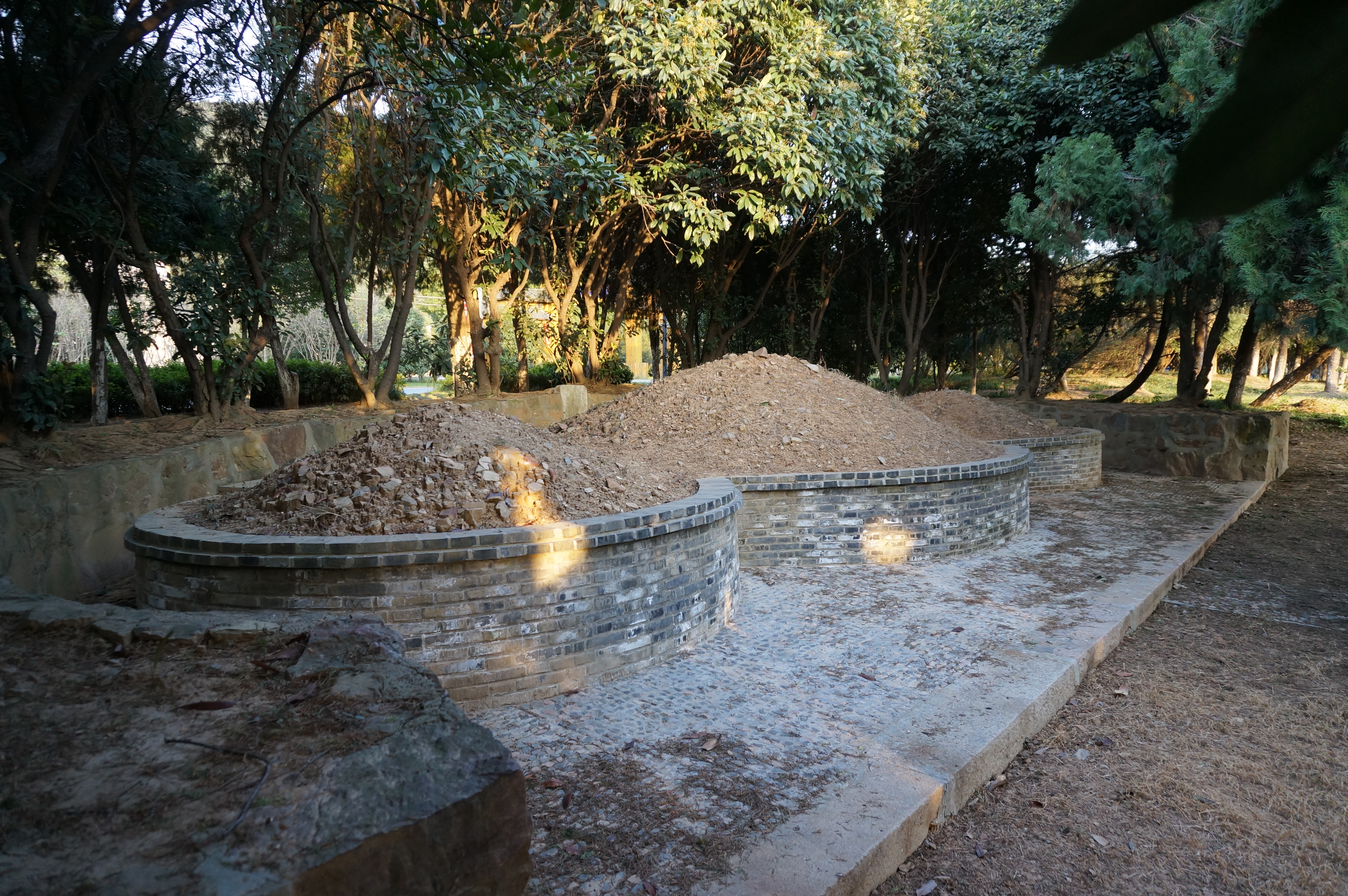 钱谦益墓，墓堆。